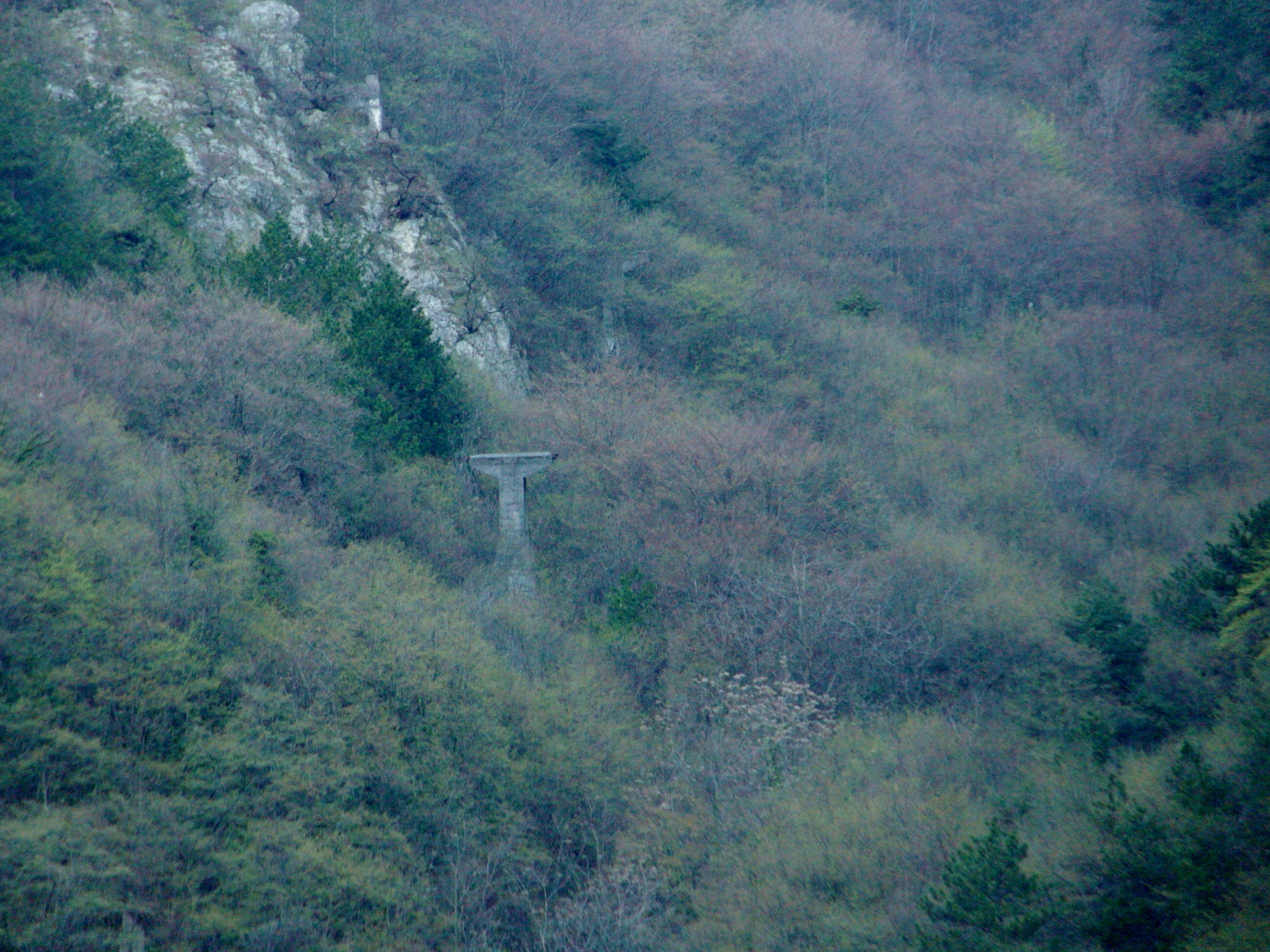 Vecchio pilone della Funivia Zambana Vecchia-Fai della Paganella